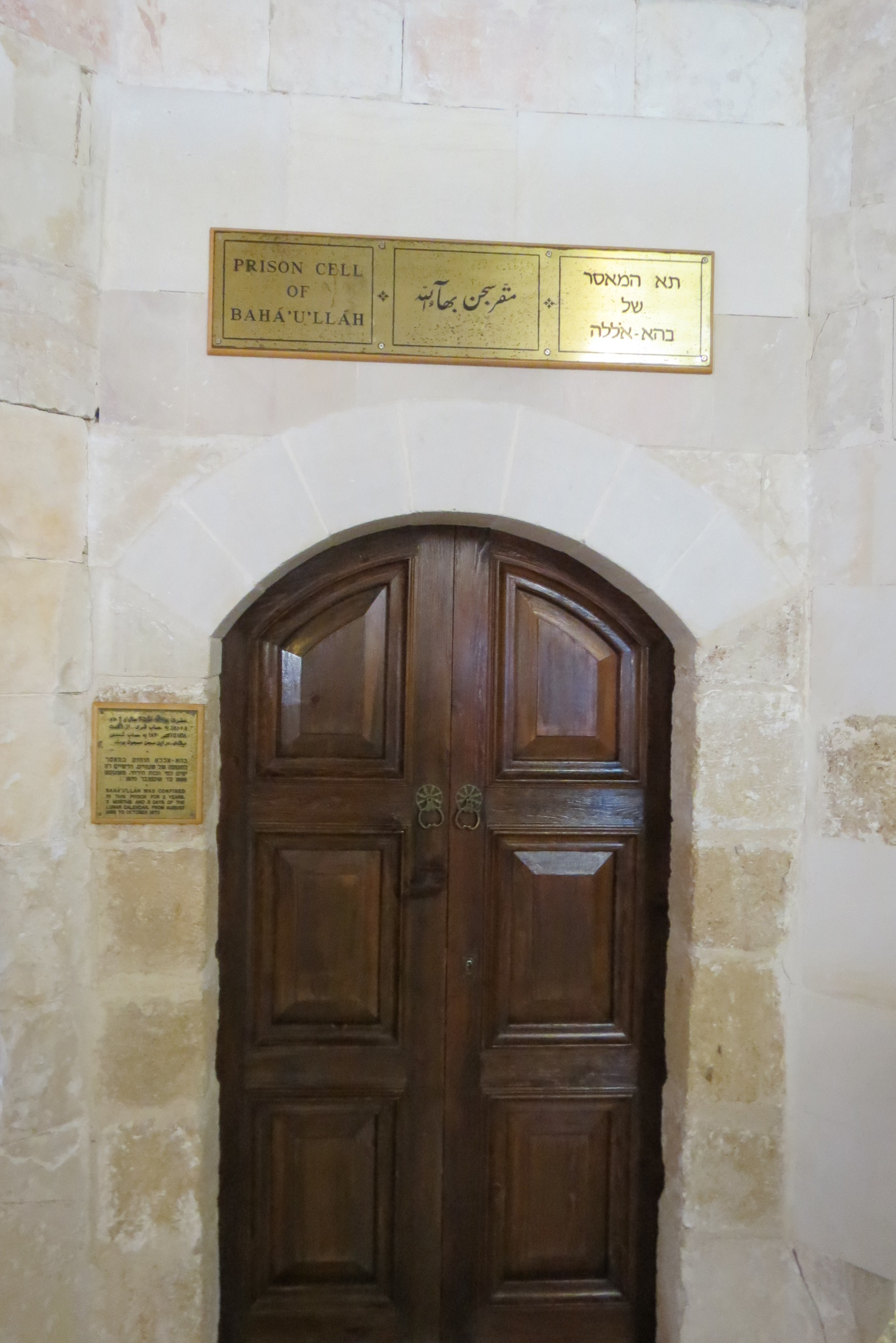 Acre, Acco Israel עכו